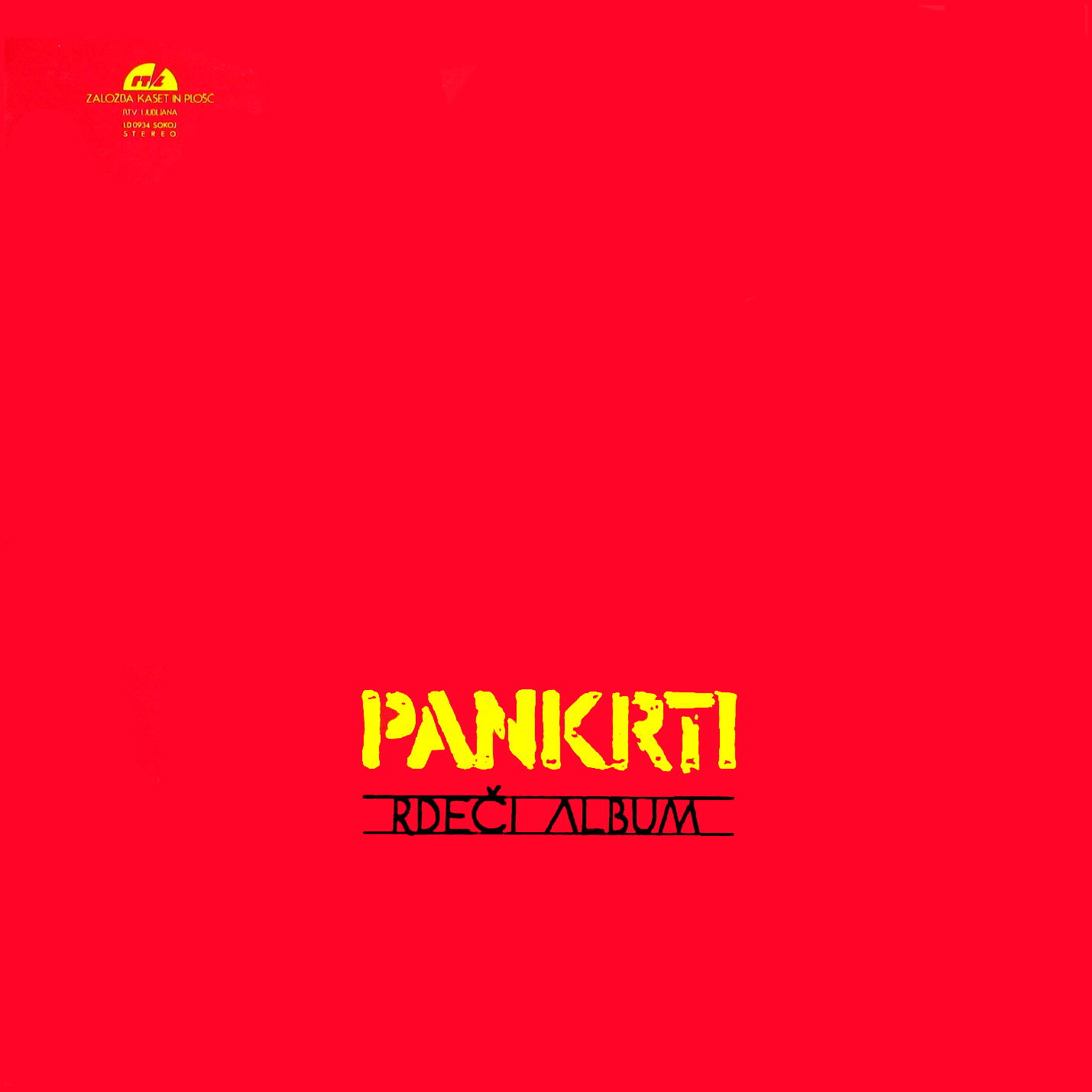 Album Rdeči album skupine Pankrti.